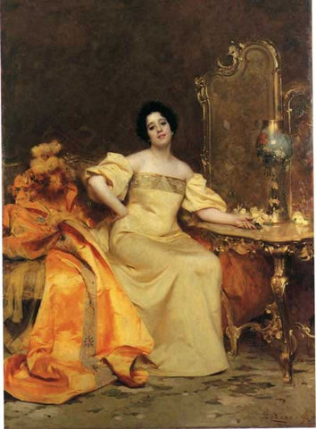 L’attrice Virginia Reyter ,1896